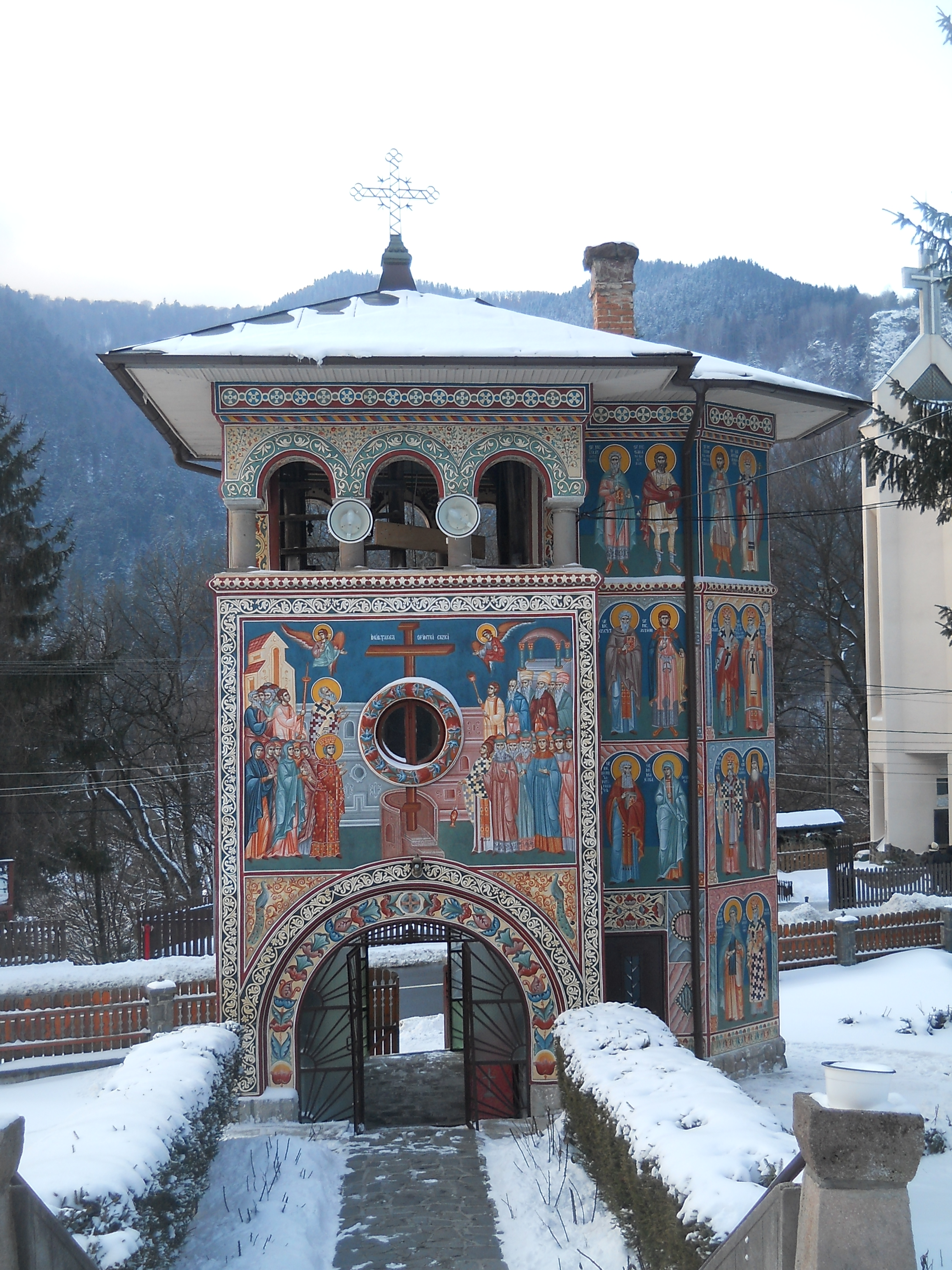 Turnul clopotniţei bisericii ortodoxe din Băile Tuşnad